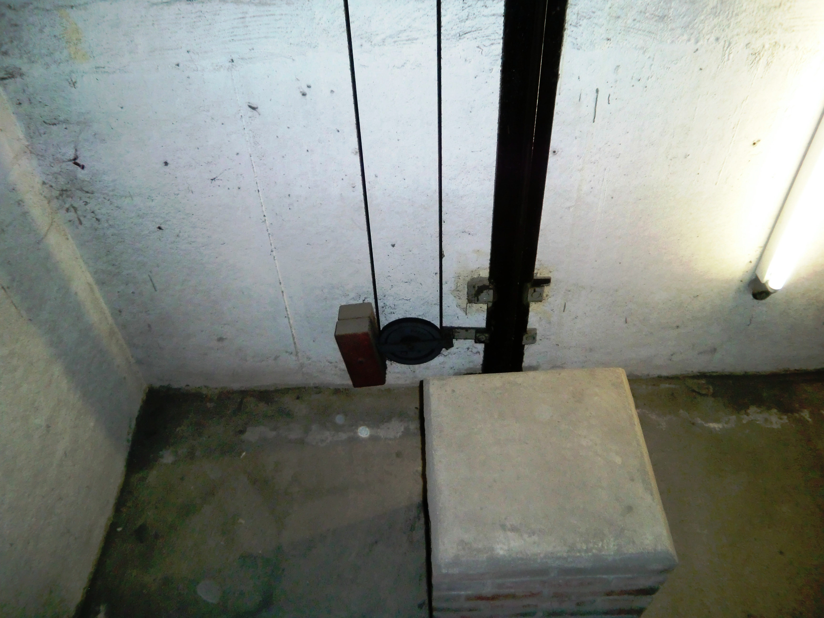 Spanngewicht und Umlenkrolle eines Geschwindigkeitsbegrenzers